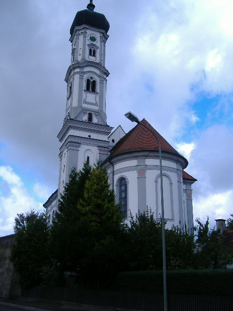 Tapfheim